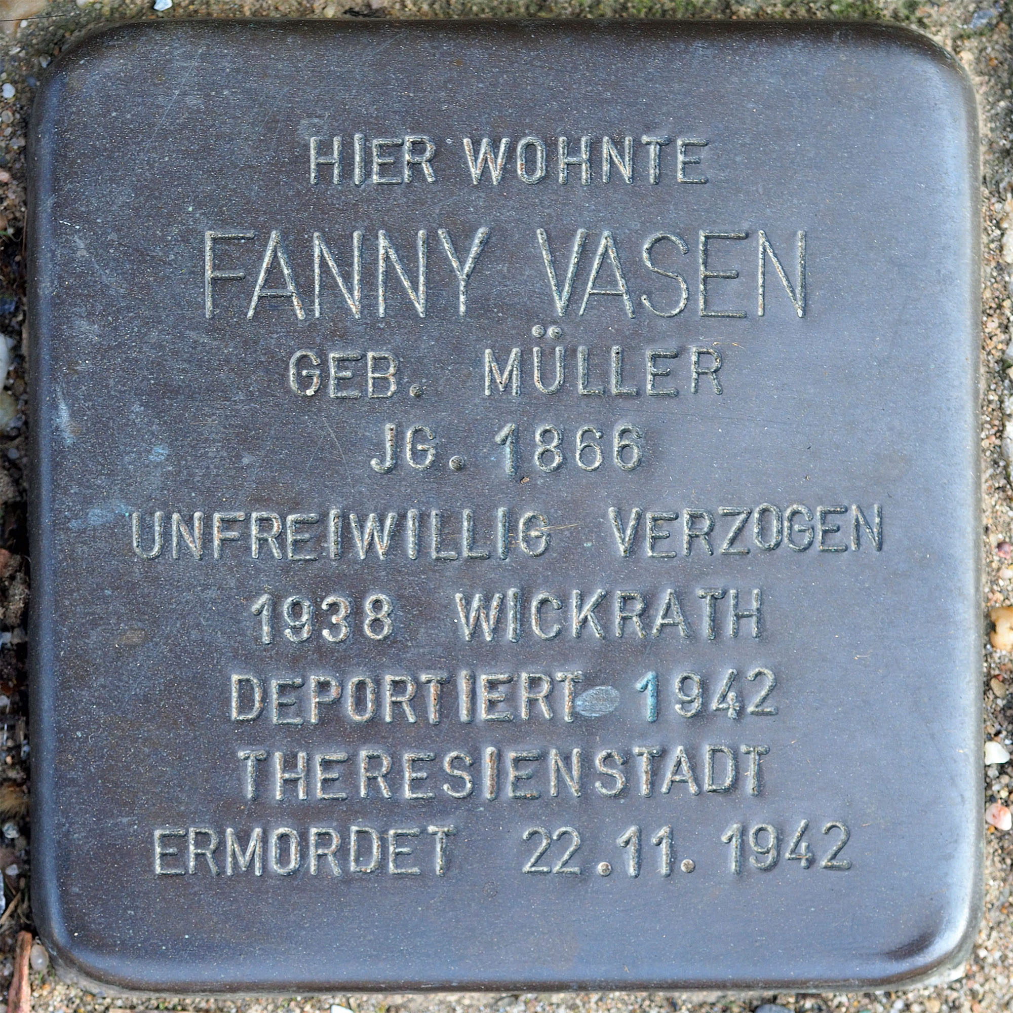 Stolpersteine GV: Vasen, Fanny